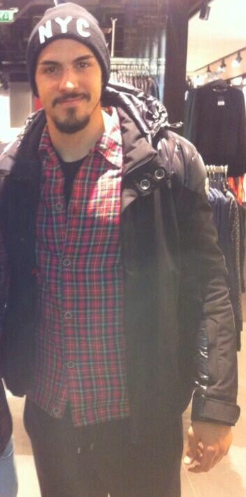 Lanzoni in 2014